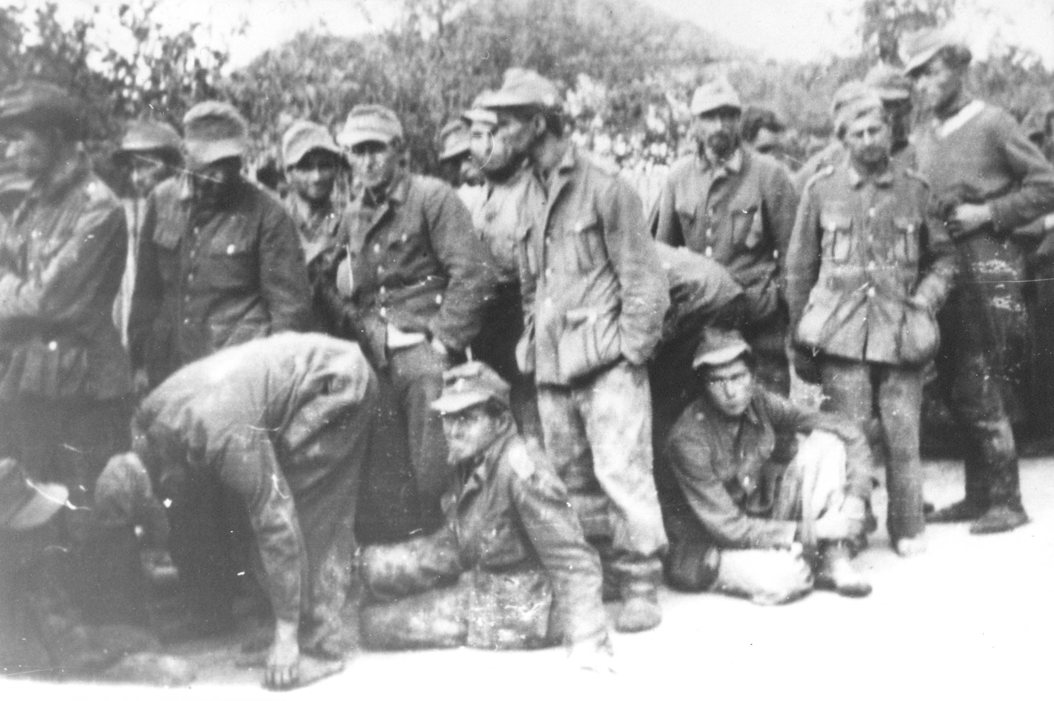 Srpskohrvatski / српскохрватски: Заробљени Немци у близини Ваљева, октобра 1944.